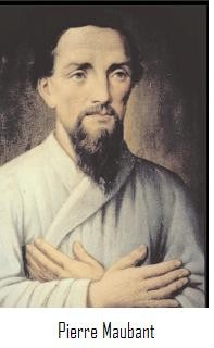 Pierre Maubant (1803-1839)